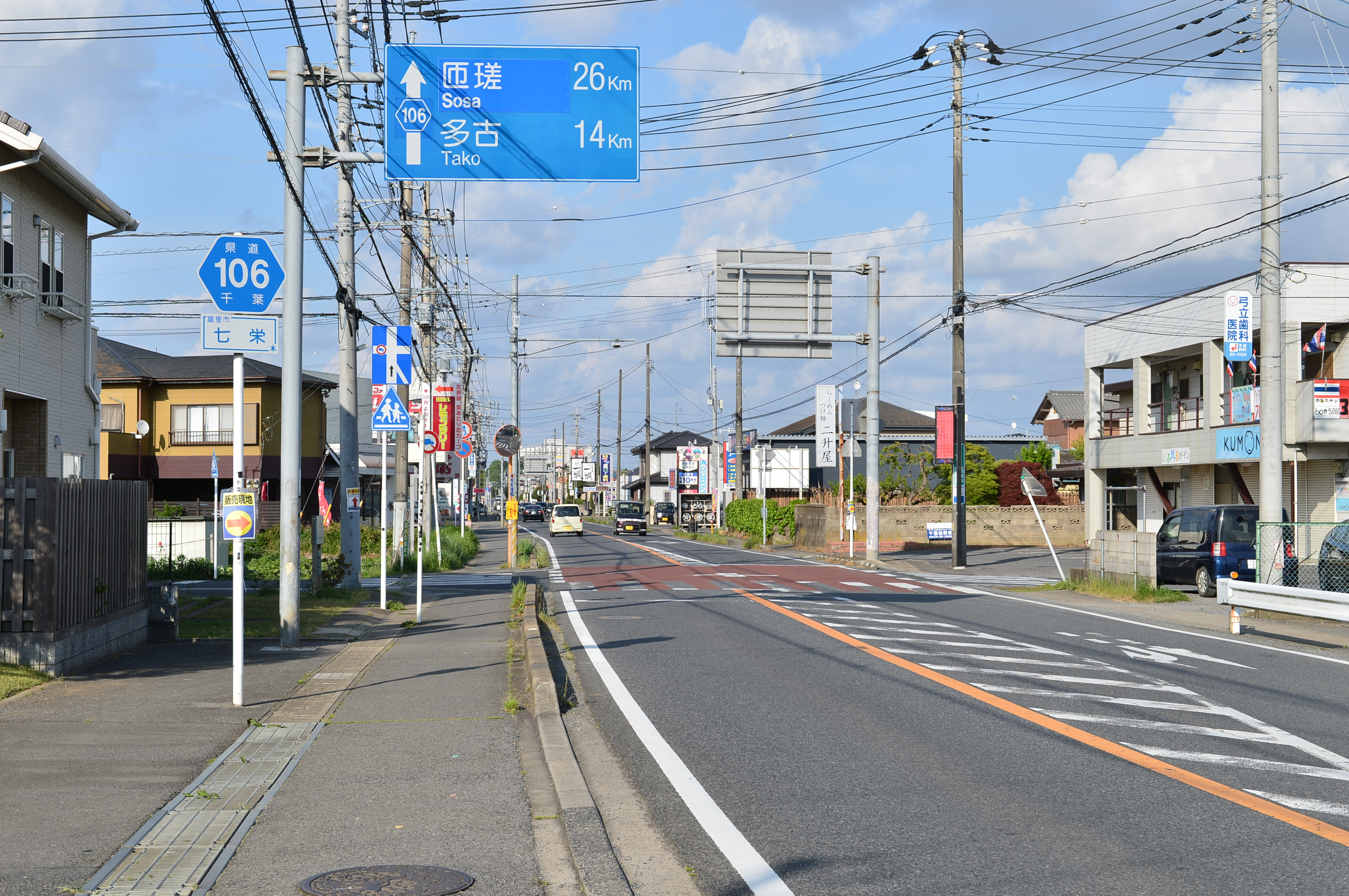 千葉県道106号八日市場佐倉線（富里市七栄）千葉県道102号交点付近にて。成田市三里塚方面に向け撮影。